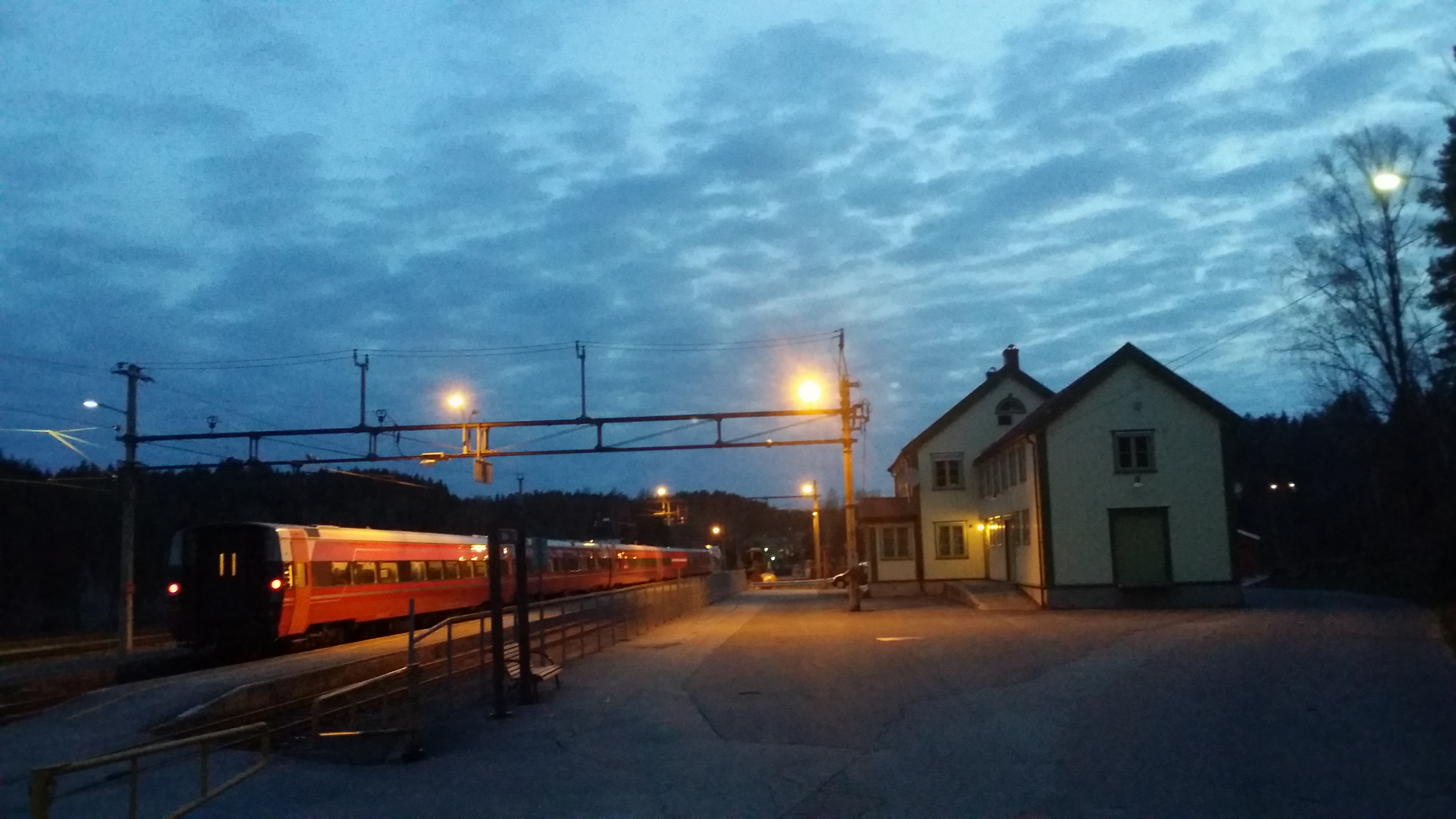 Nattoget til Oslo på Neslandsvatn stasjon.